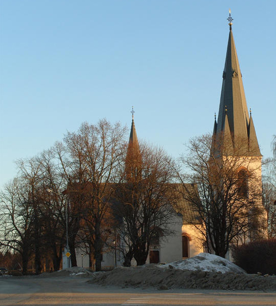 Kyrkan i Harmånger